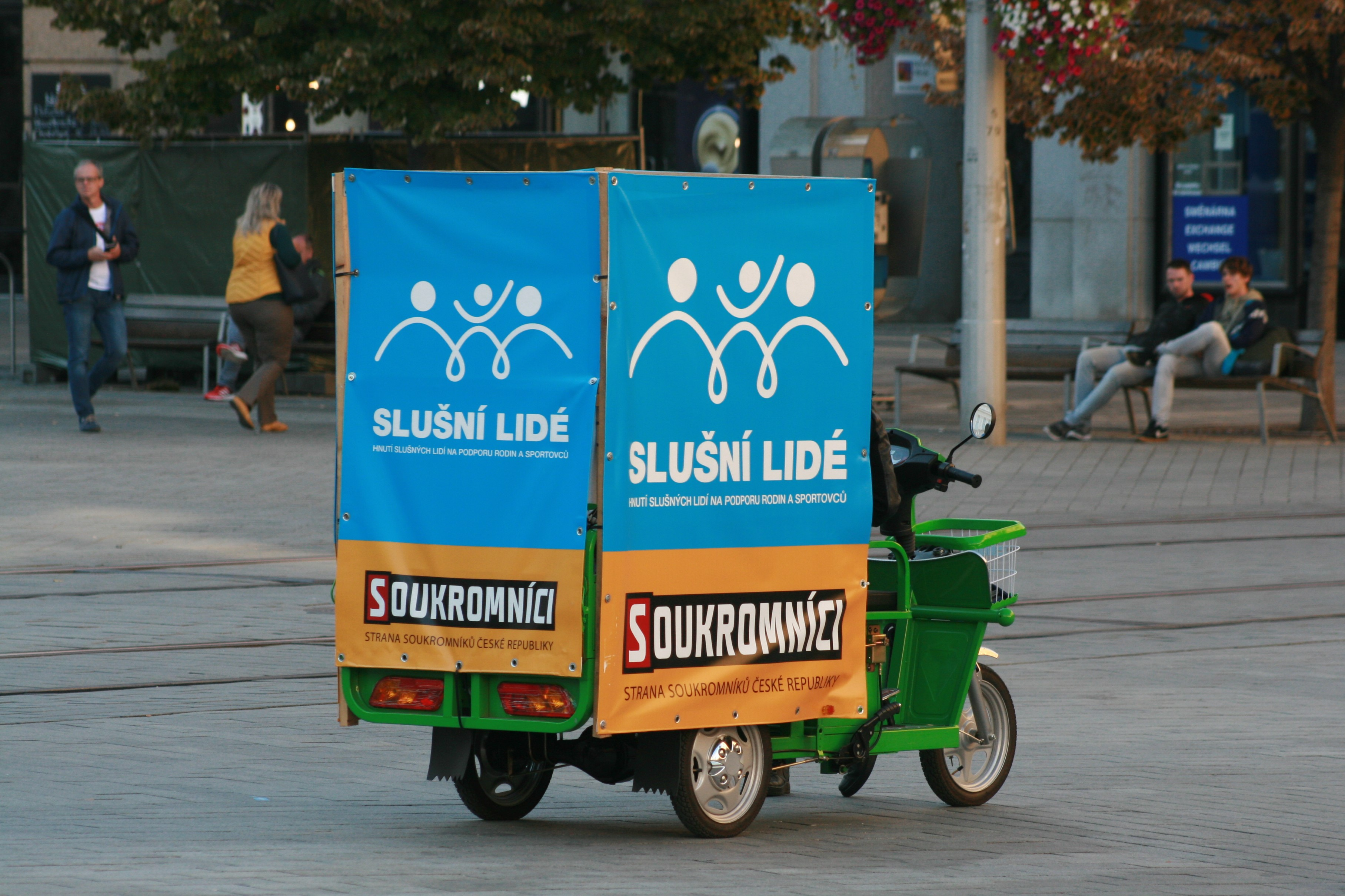 Předvolební tříkolka politického uskupení Slušní lidé a Soukromníci v Brně před komunálními (a senátními) volbami v říjnu 2018.